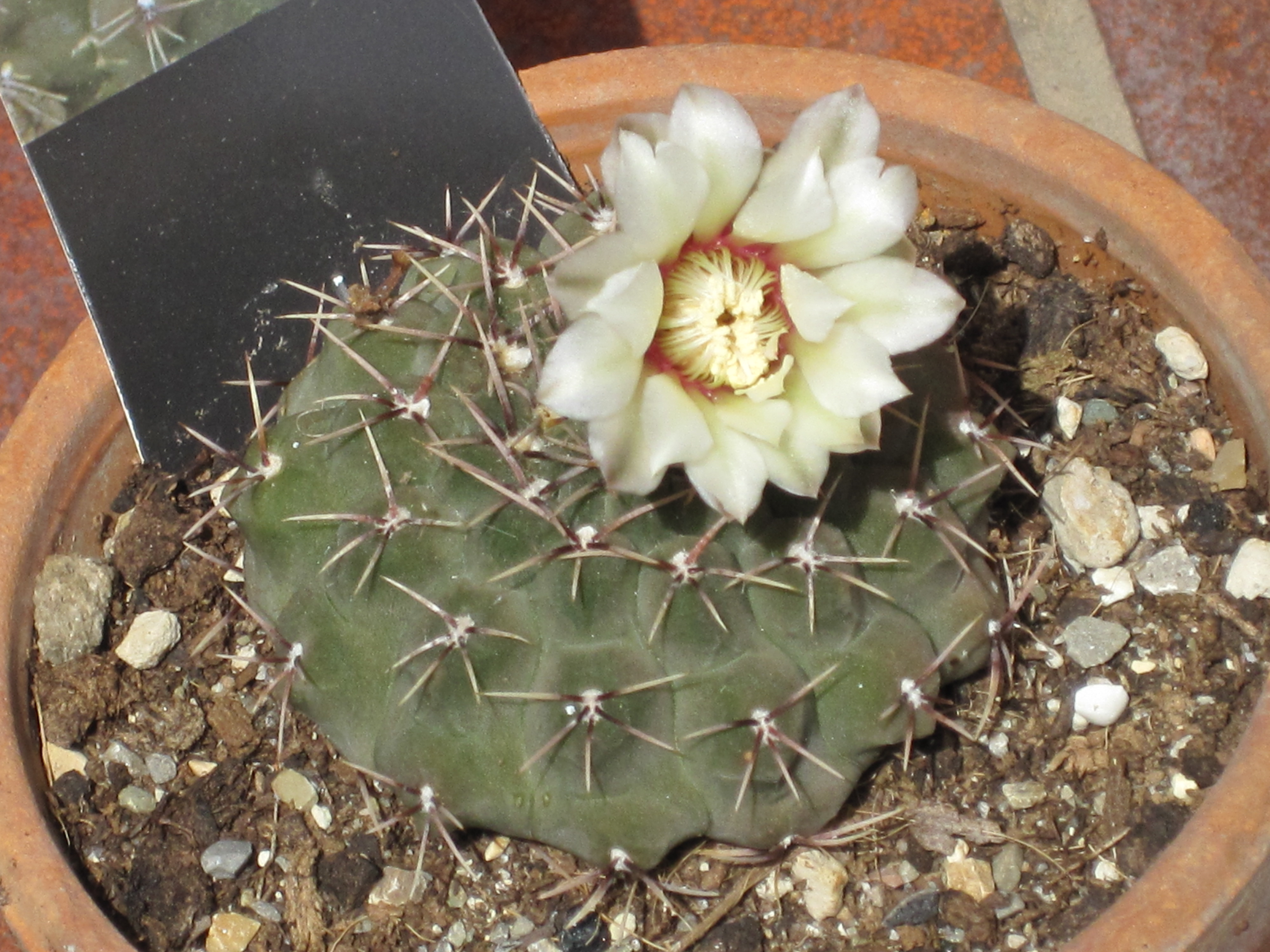 Gymnocalycium quehlianum in fiore